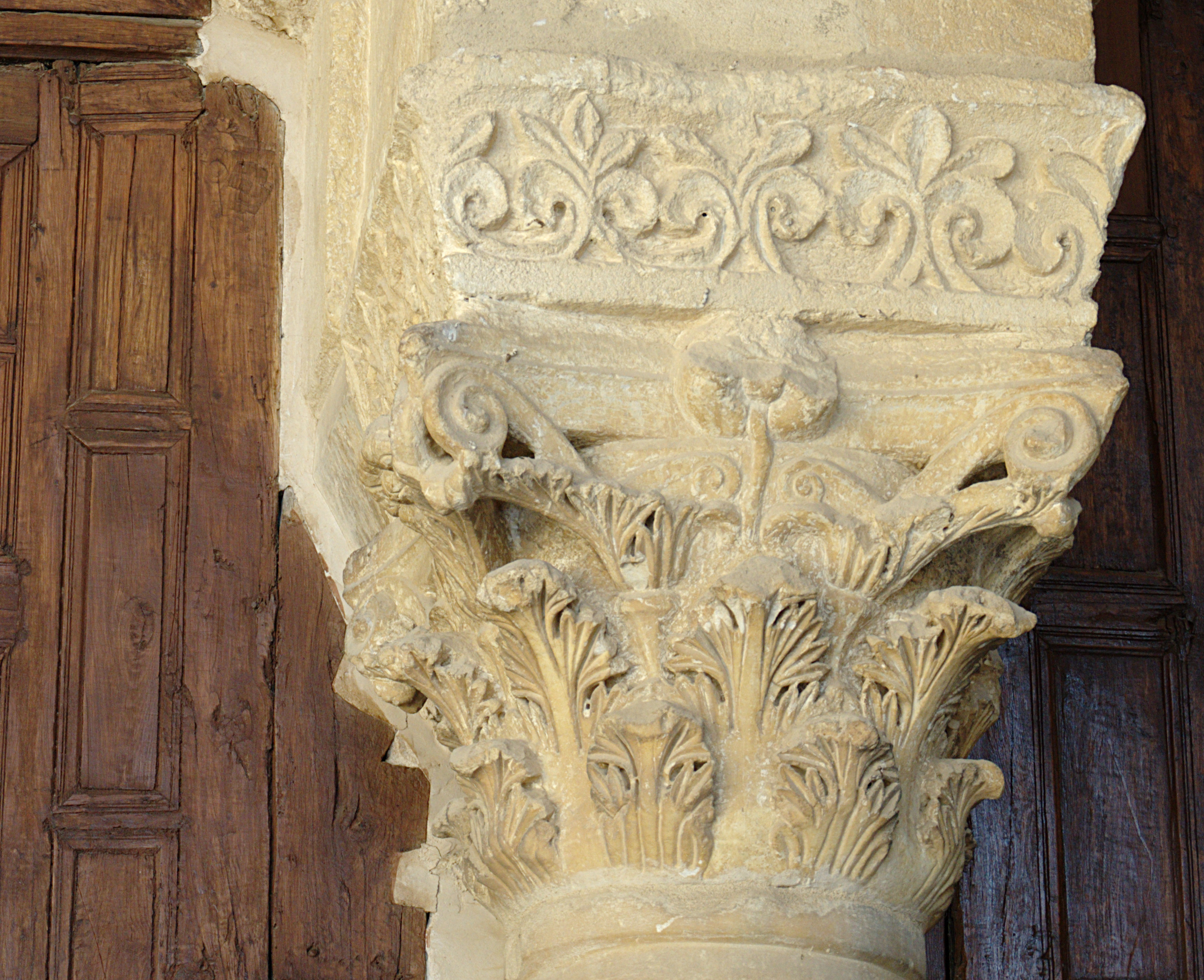 Grande Mosquée (Sidi Okba), Kairouan